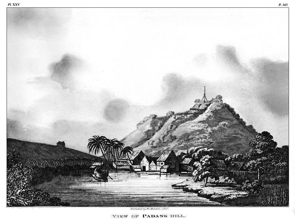 View of Padang Hill